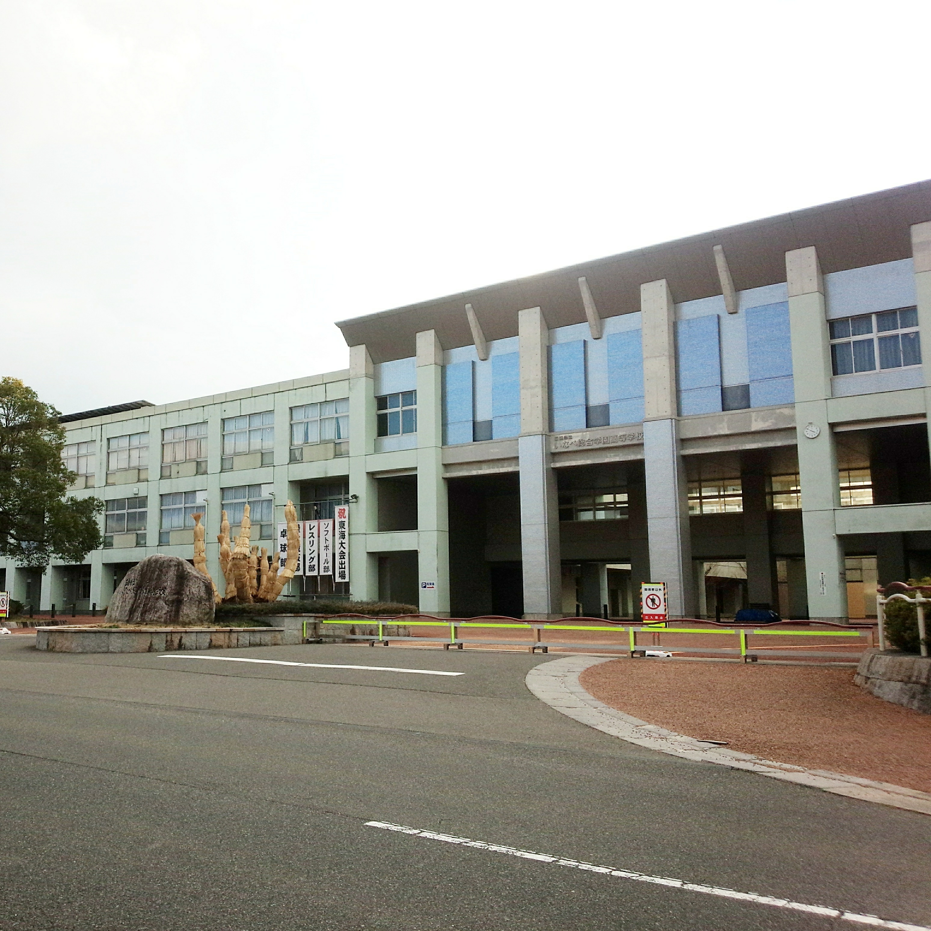 三重県立いなべ総合学園高等学校校舎